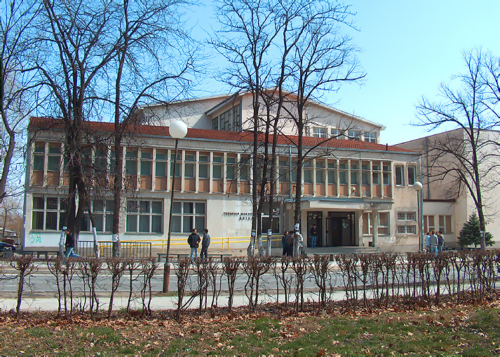 Технички Факултет во Битола